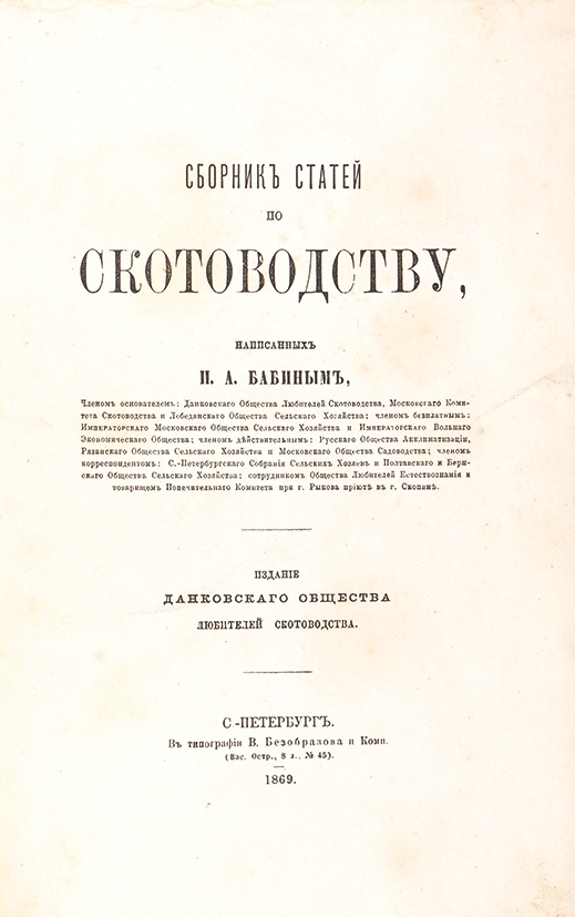 Сборник статей по скотоводству, написанных И.А. Бабиным. СПб.: Издание Данковского общества любителей скотоводства; В тип. В. Безобразова и Комп., 1869. VIII, 293 с., 4 л. таб. 23,5 х 15,8 см.